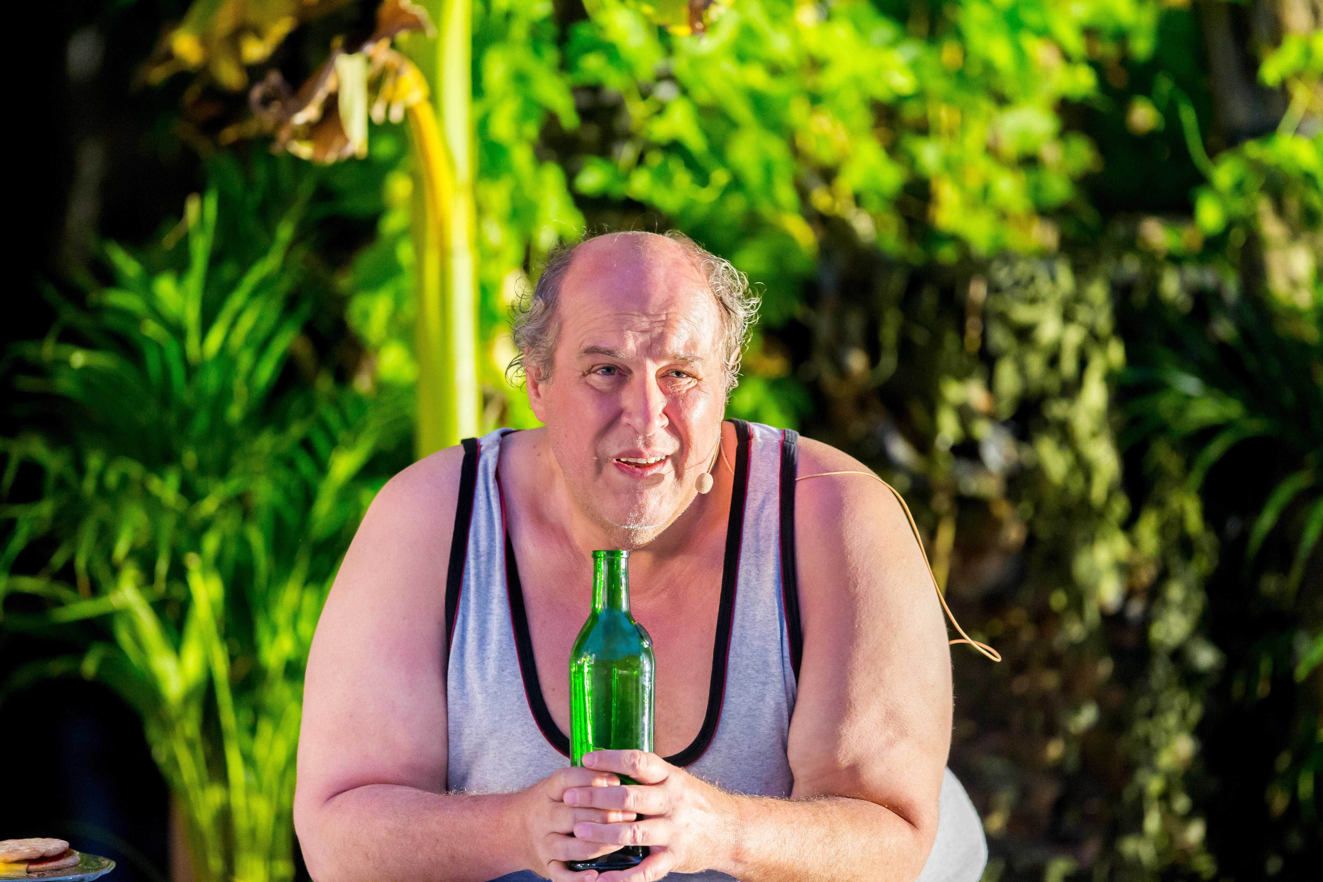 2016: Uraufführung: "GOLD. Der Film der Nibelungen" Regie: Nuran David Calis Autor: Albert Ostermaier Intendant: Nico Hofmann --- Ensemble: Produzent Konstantin Trauer: Uwe Ochsenknecht Regisseur Arsenij Kubik: Vladimir Burlakov Drehbuchautor Charlie P. Weide: Josef Ostendorf Society Reporter Peter Scheumer: Dominic Raacke Kamerafrau "the eye": Anna Rot Setdesignerin "set": Joy Maria Bai Assistentin des Produzenten Carmen: Alexandra Kamp Maskenbildnerin Sueyla Blume : Ayse Bosse die Ältere Kriemhild Karina Bergmann: Katja Weitzenböck die Jüngere Kriemhild Simone Gehel: Constanze Wächter die Ältere Brünhild Lotte Jünger: Michaela Steiger die Jüngere Brünhild Nathalie Aurun: Dennenesch Zoudé Siegfried Mohamad Söder: Ismail Deniz Hagen René Inner: Sascha Göpel Gunther Klaus Castel: Maximilian Laprell Bürgermeister Franz Koppoler: Heiner Lauterbach during Nibelungenfestspiele "GOLD. Der Film der Nibelungen" at Wormser Kaiserdom, Worms, Rheinland Pfalz, Germany on 2016-07-12, Photo: Sven Mandel